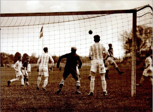 finale de la Coupe de France de football 1924-1925 opposant le FC Rouen au CASG.